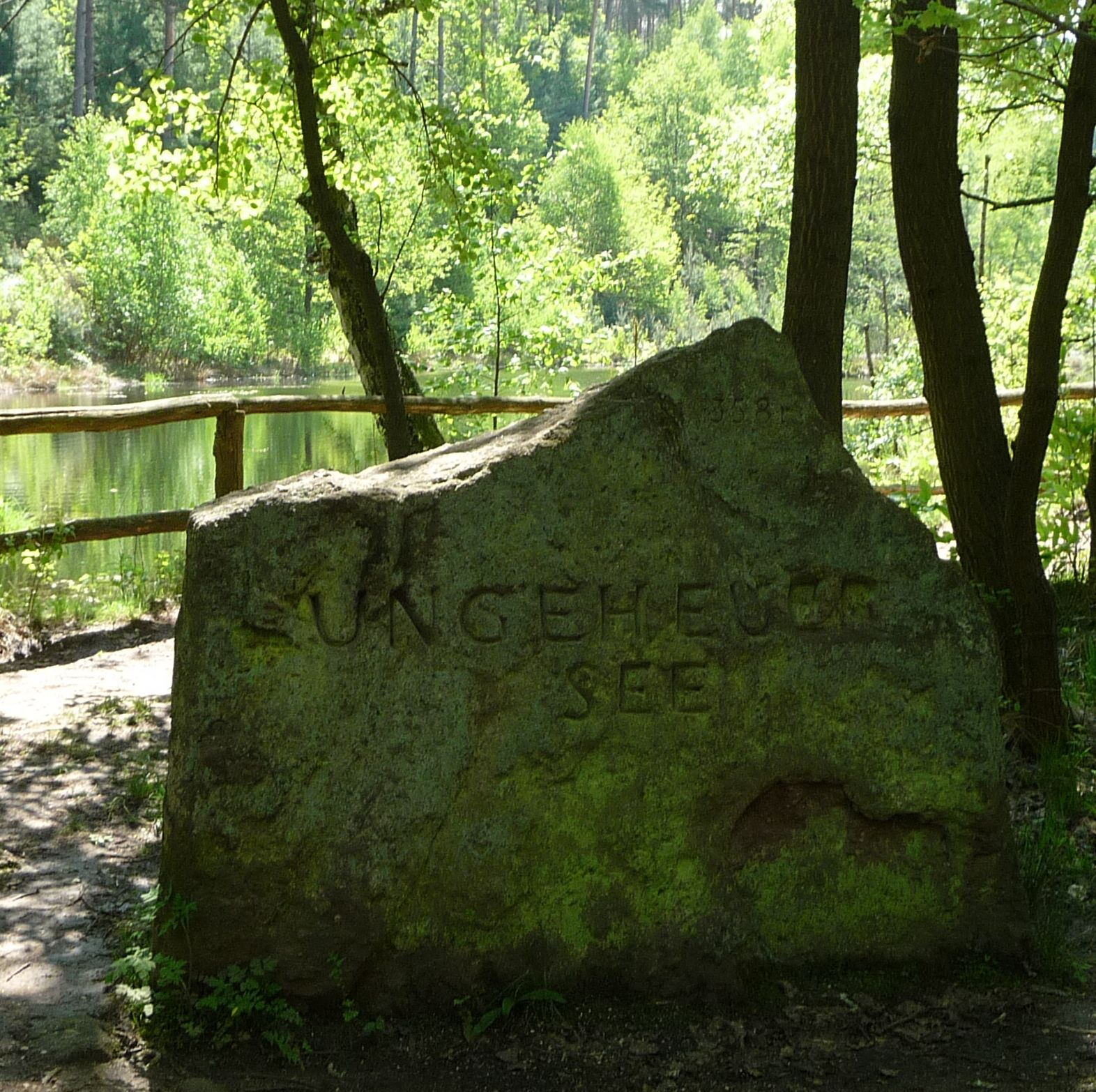 Ungeheuersee